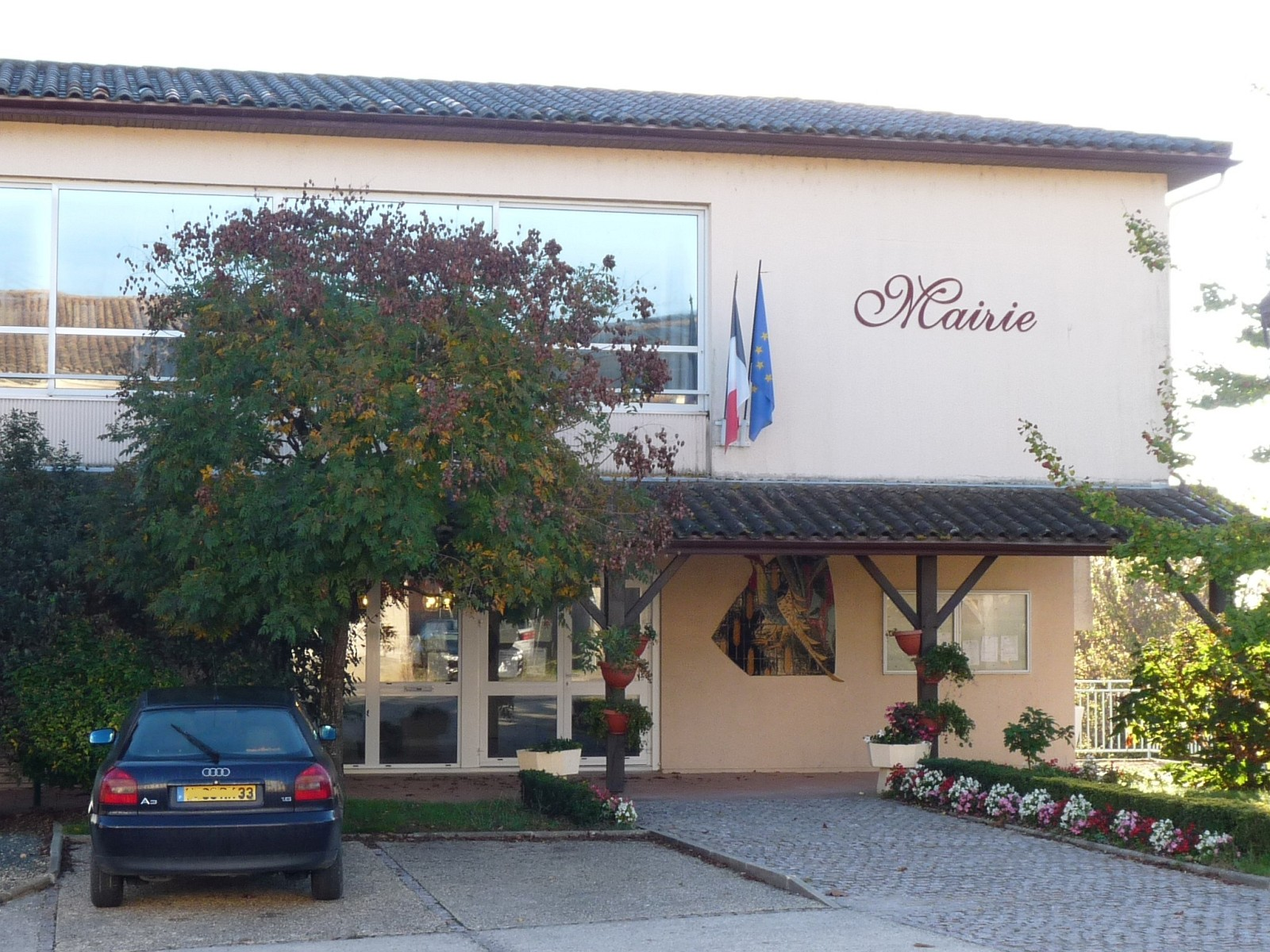 Mairie de Maransin, Gironde, France